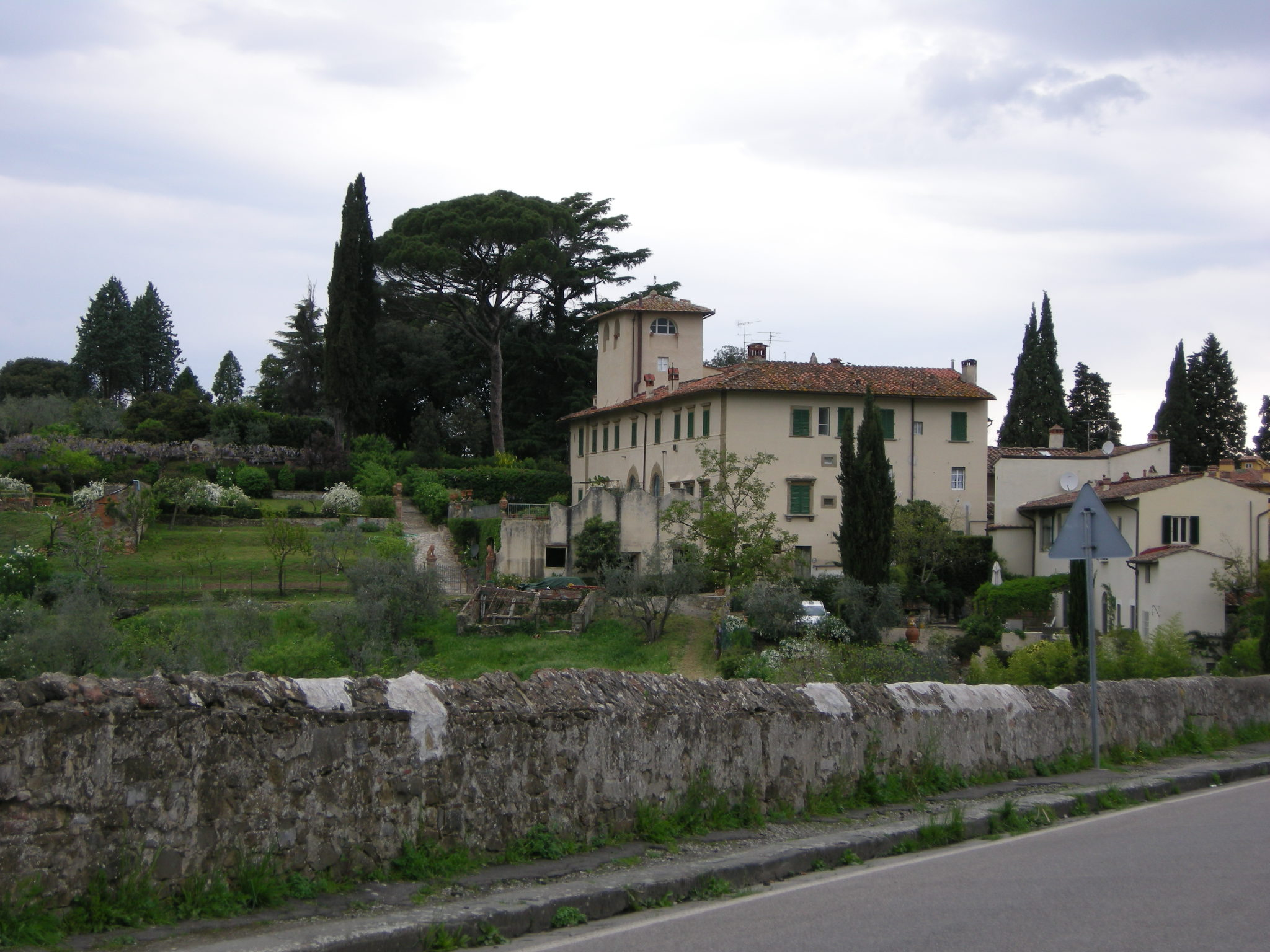 Villa di volsanminiato